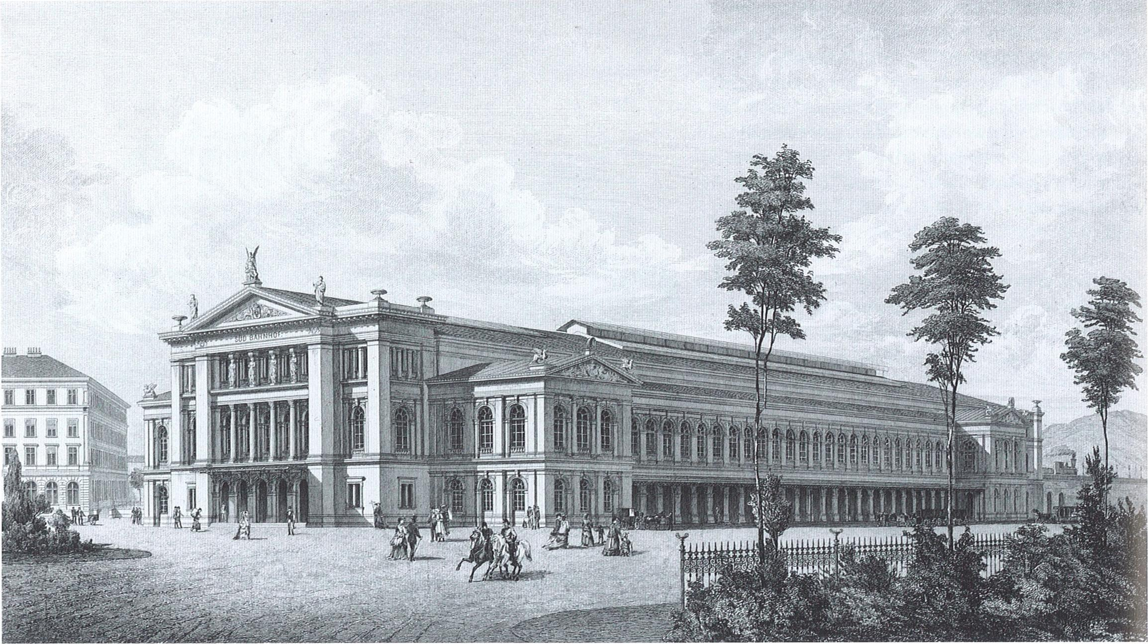 "Der Südbahnhof in Wien", Perspektive.